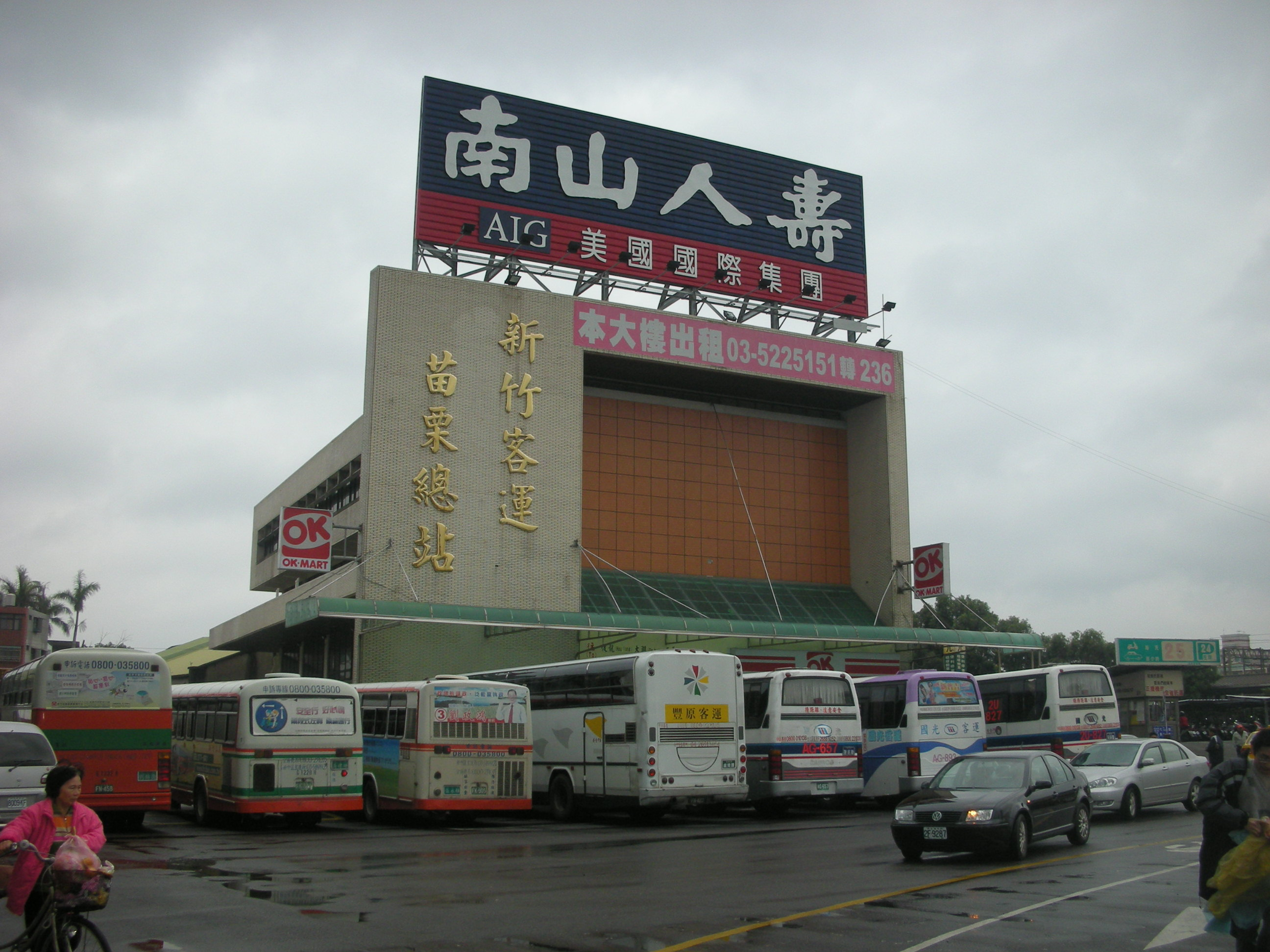 新竹客運苗栗總站與南山人壽廣告牌